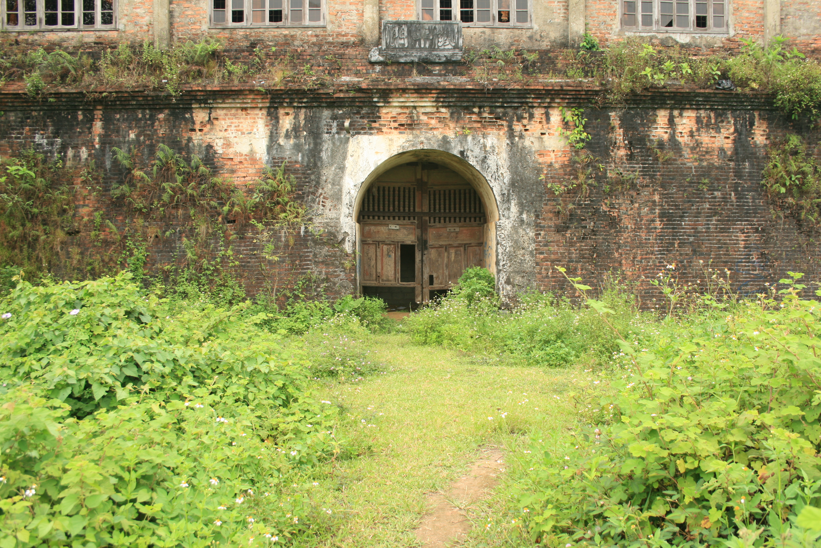 Trấn Bình môn, cổng vào Trấn Bình đài, ảnh chụp từ Trấn Bình đài.